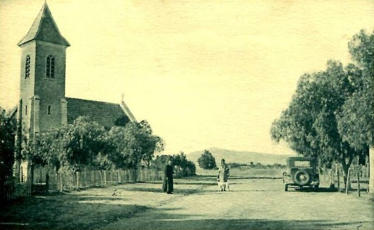 Église de Gafsa en Tunisie dans les années 1930